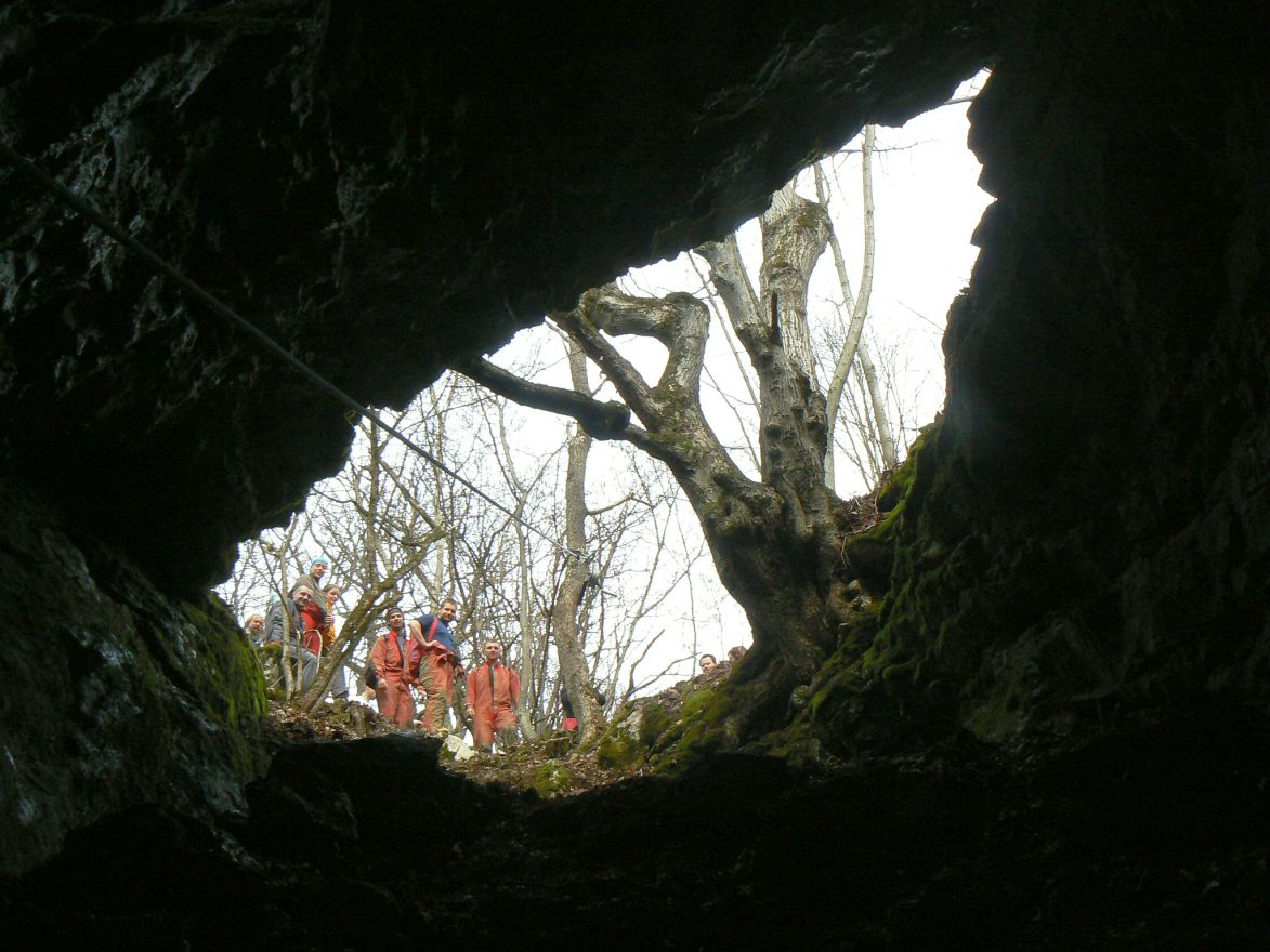 Jaskyňa Lipový most predstavuje relikt inaktívnej fluviokrasovej jaskyne, už v senilnom štádiu vývoja. V jaskyni sa našli pozostatky troch ľudí, pravdepodobne z čias druhej svetovej vojny.